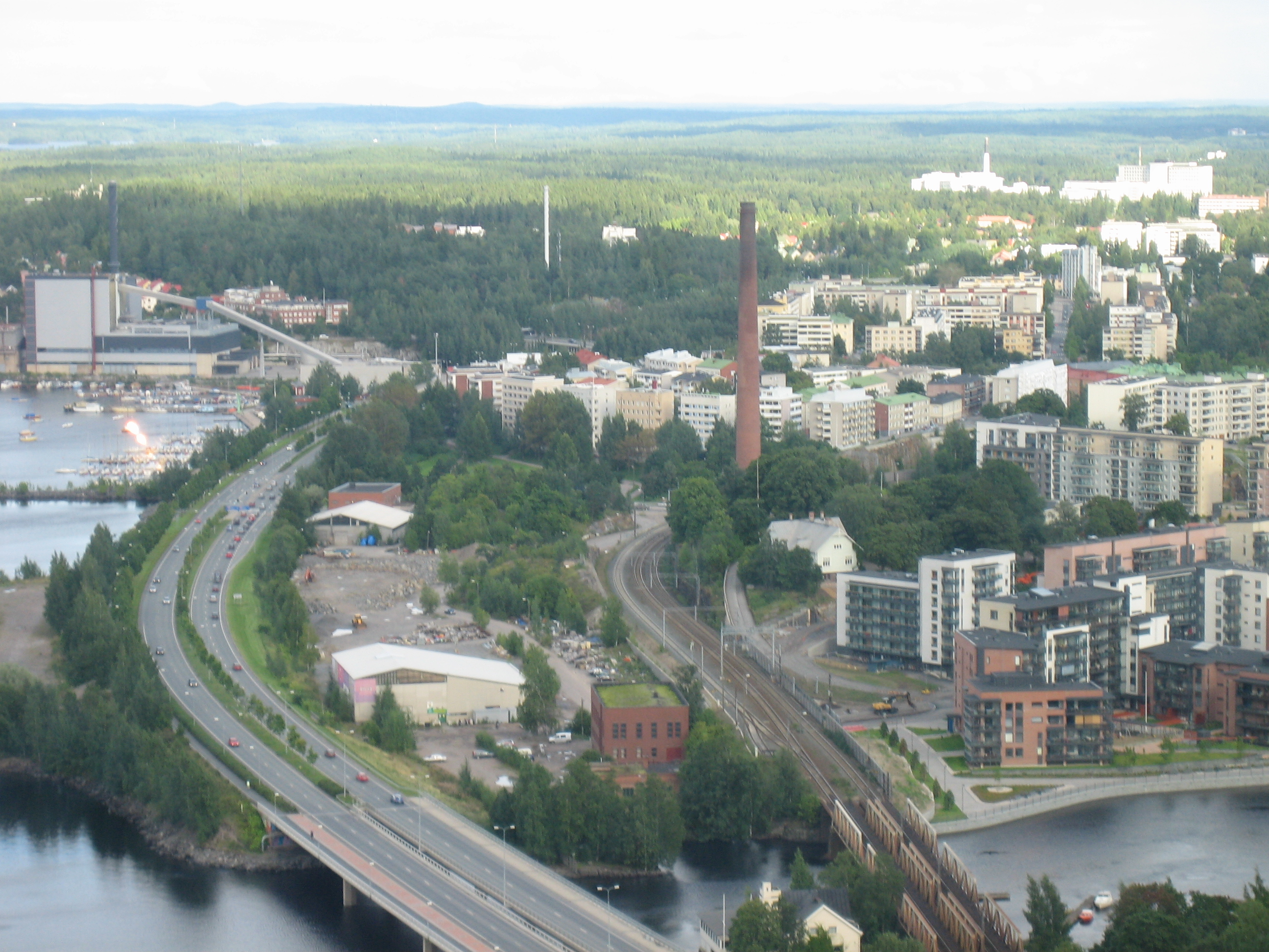 Näsinneulasta itse kuvattu näkymä Tampereen Naistenlahteen, Kekkosentielle, Armonkalliolle ja Tampellan alueelle.